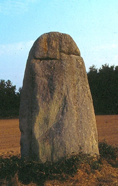 megalithe menhir Bissin - Guérande (Loire-Atlantique) - France